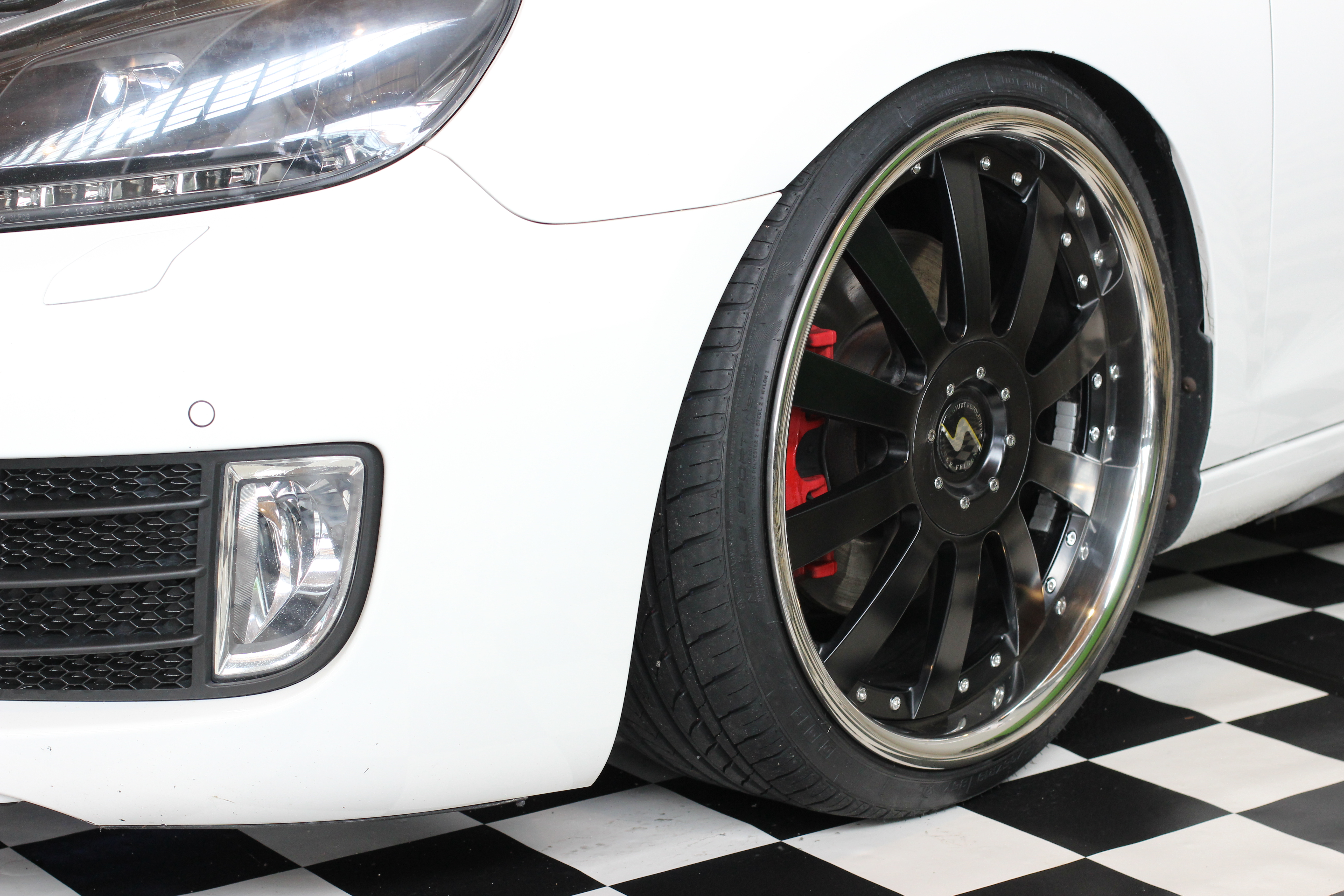 Schwarze Leichtmetallfelge mit Niederquerschnittsreifen auf einem VW Golf VI/VII